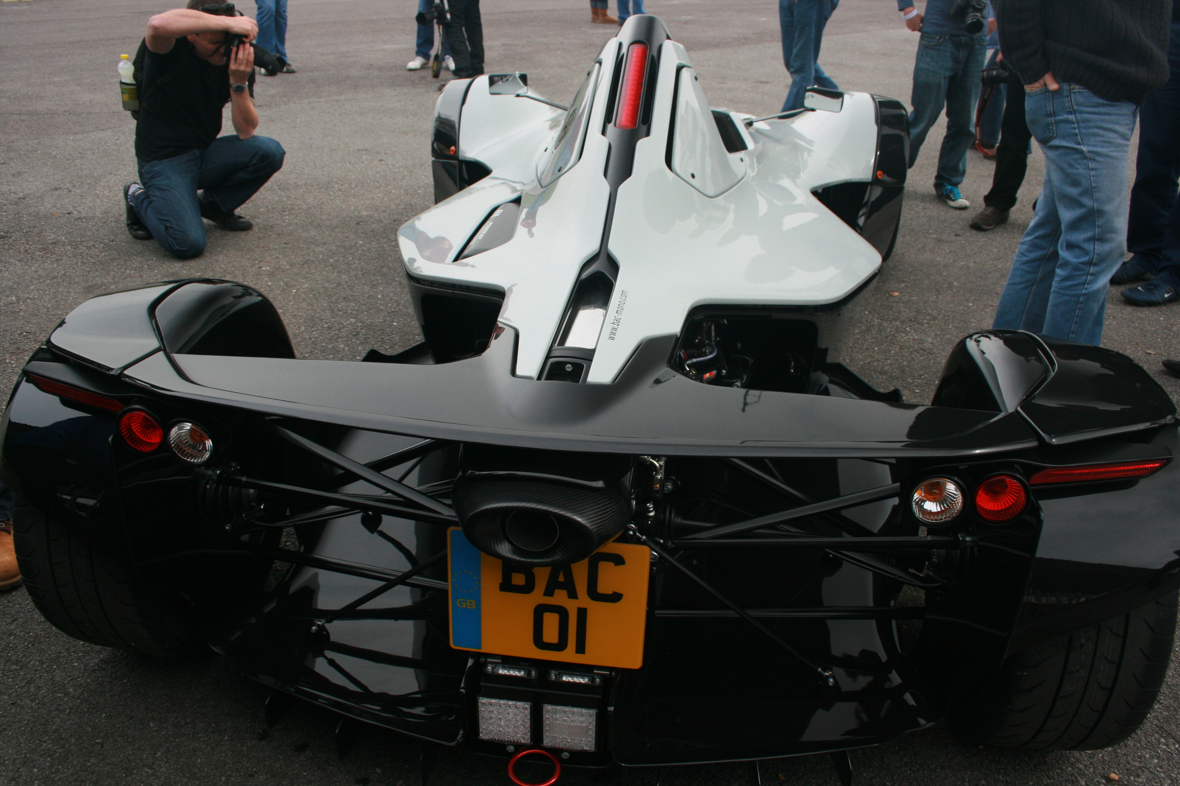 BAC Mono